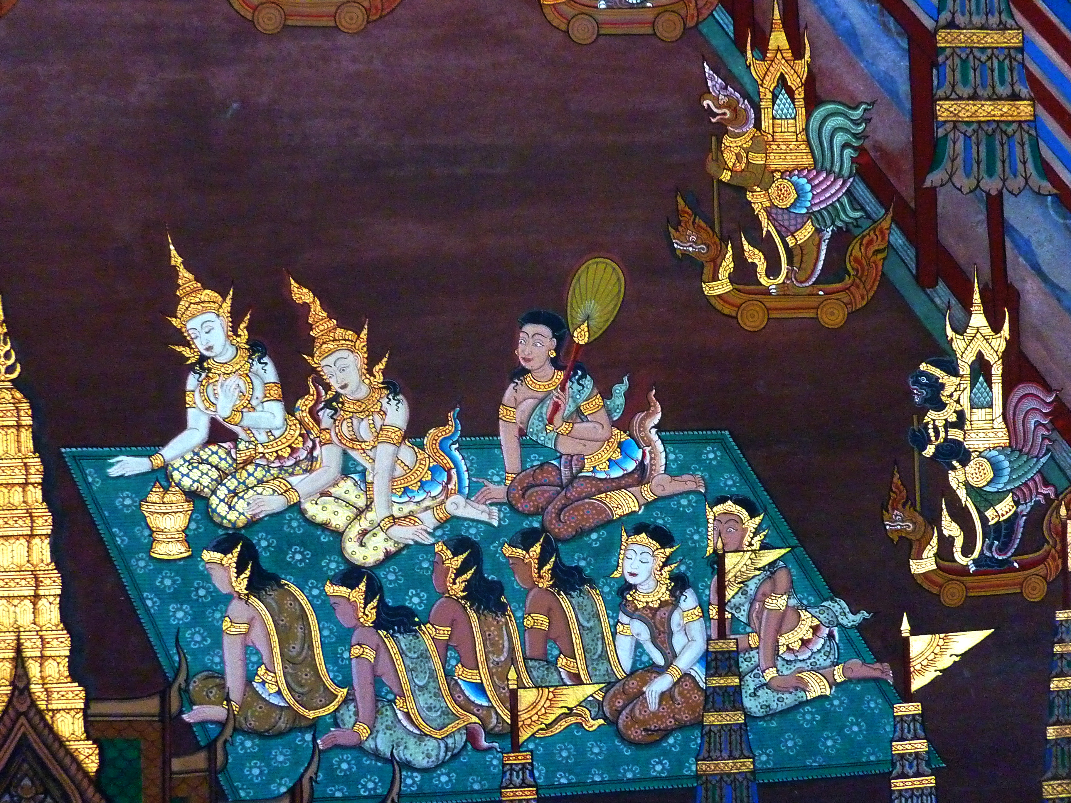 Wat Phra Kaew, Bangkok